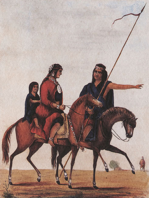 . Indios, 1844, litografía coloreada, 26 x 20 cm.